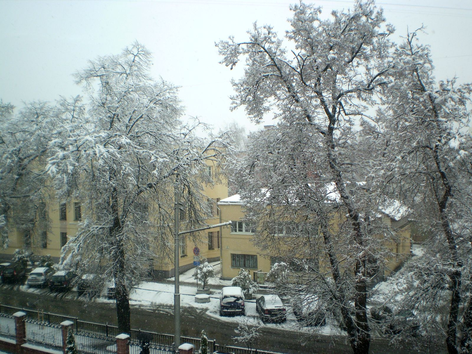 Пакрытыя снегам дрэвы